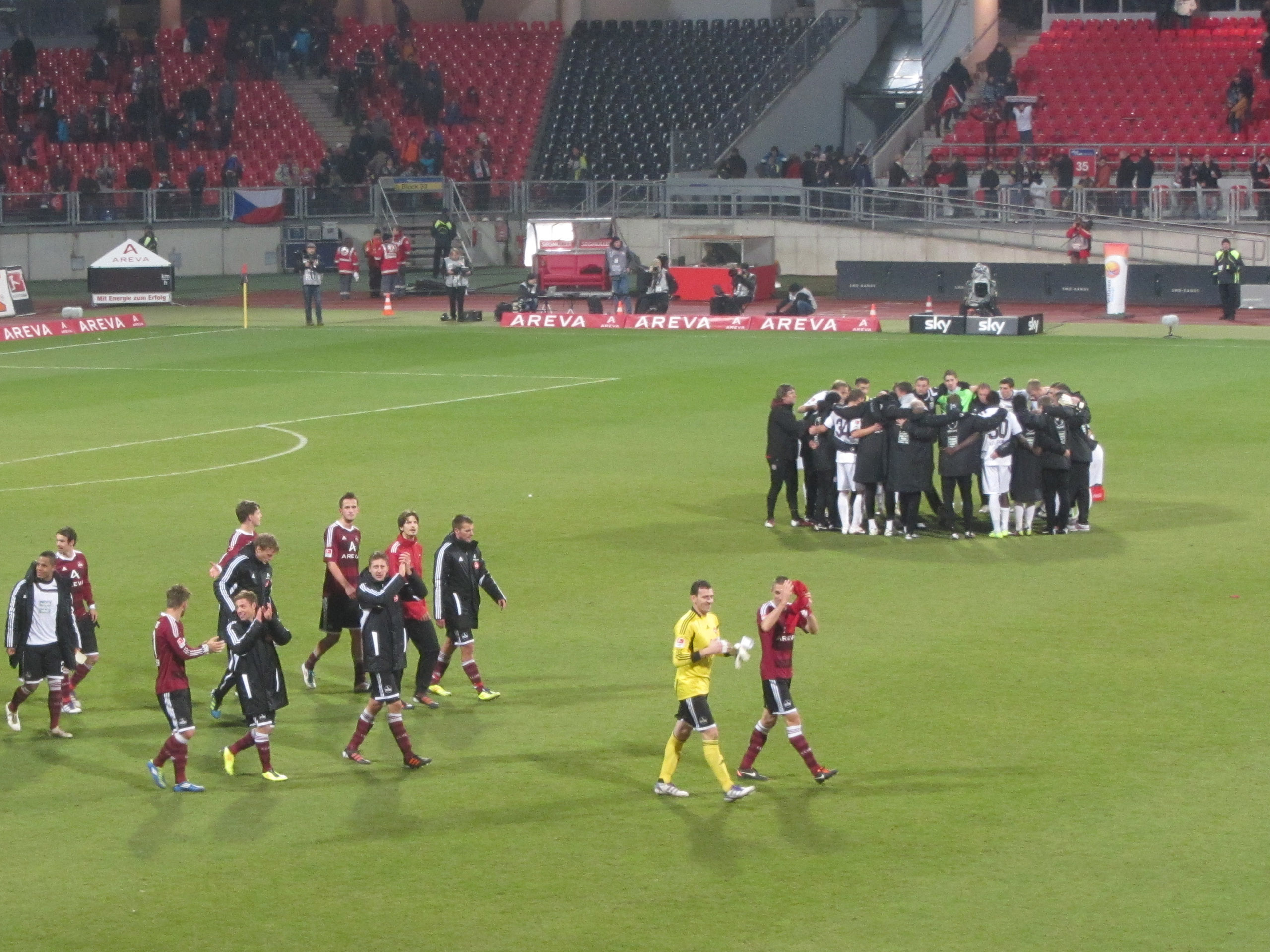 Club - Lautern 26. November 2011 easycredit-Stadion, Nürnberg, Deutschland